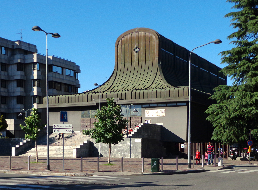 Milano, chiesa di San Nicolao della Flue.